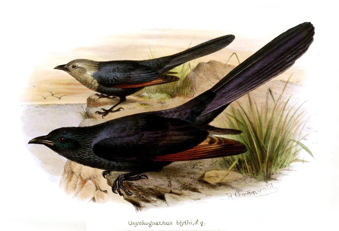 Onychognathus blythii